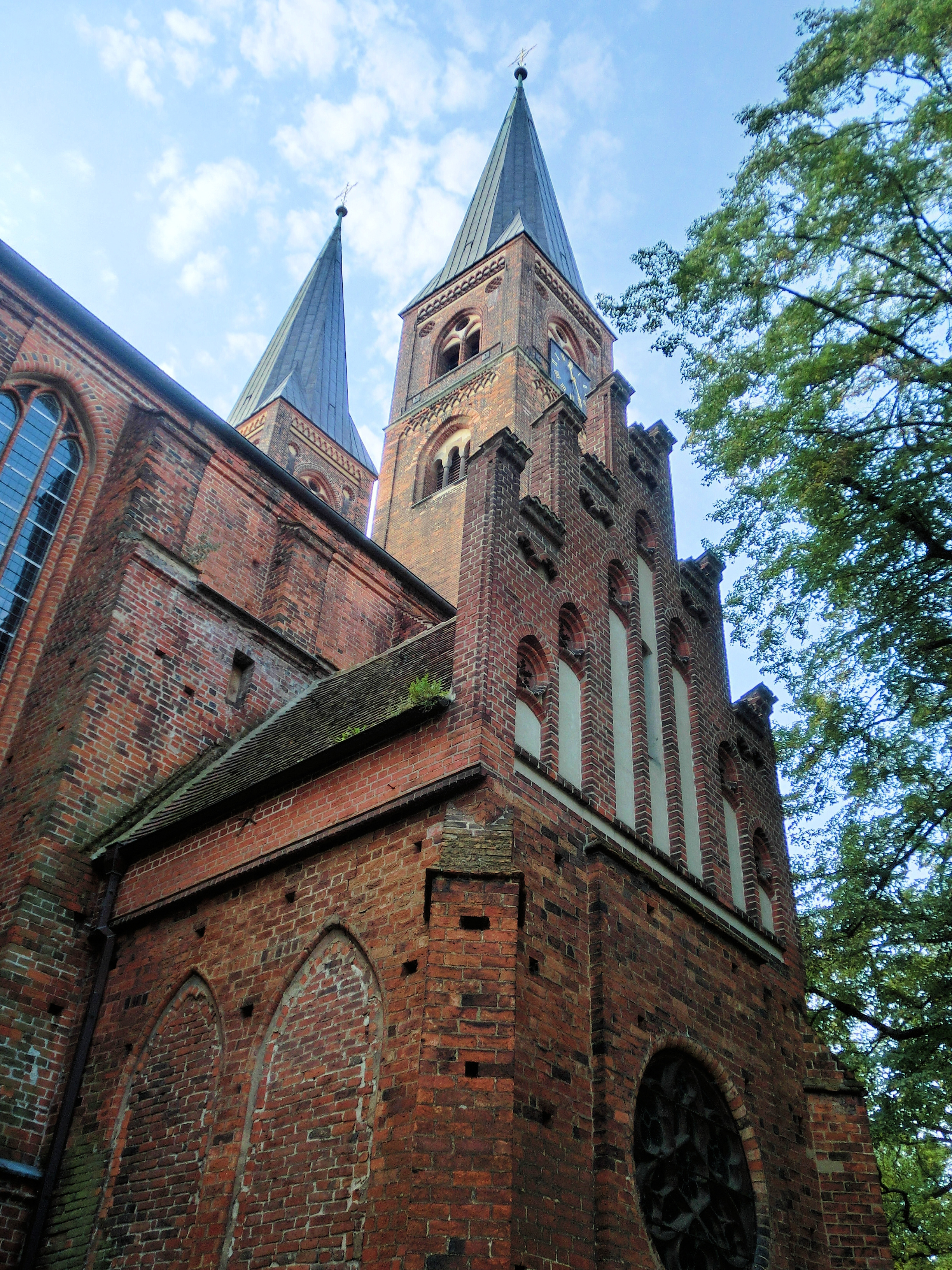 Stendal Dom Türme